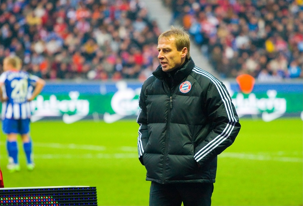 Jürgen Klinsmann